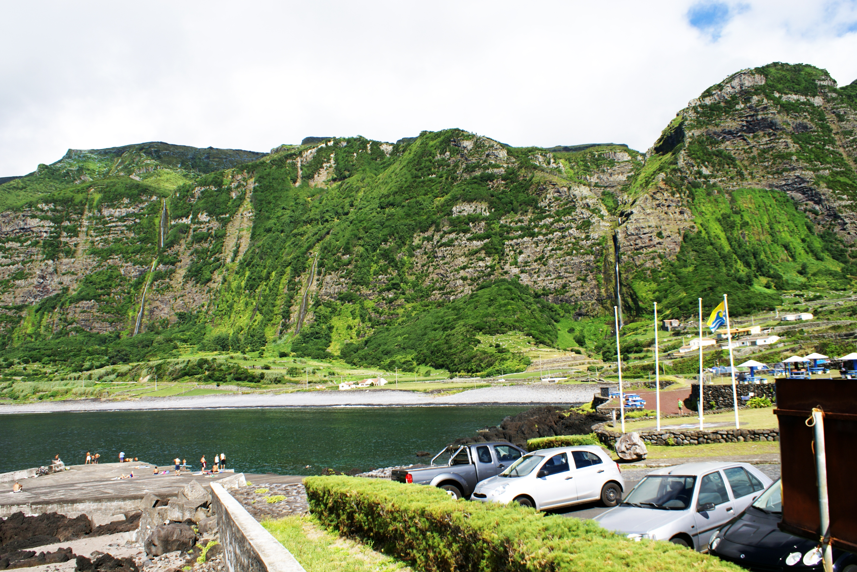 Porto e zona balnear da Fajã Grande, ilha das Flores, Açores, Arquivo de Villa Maria, ilha Terceira, Açores